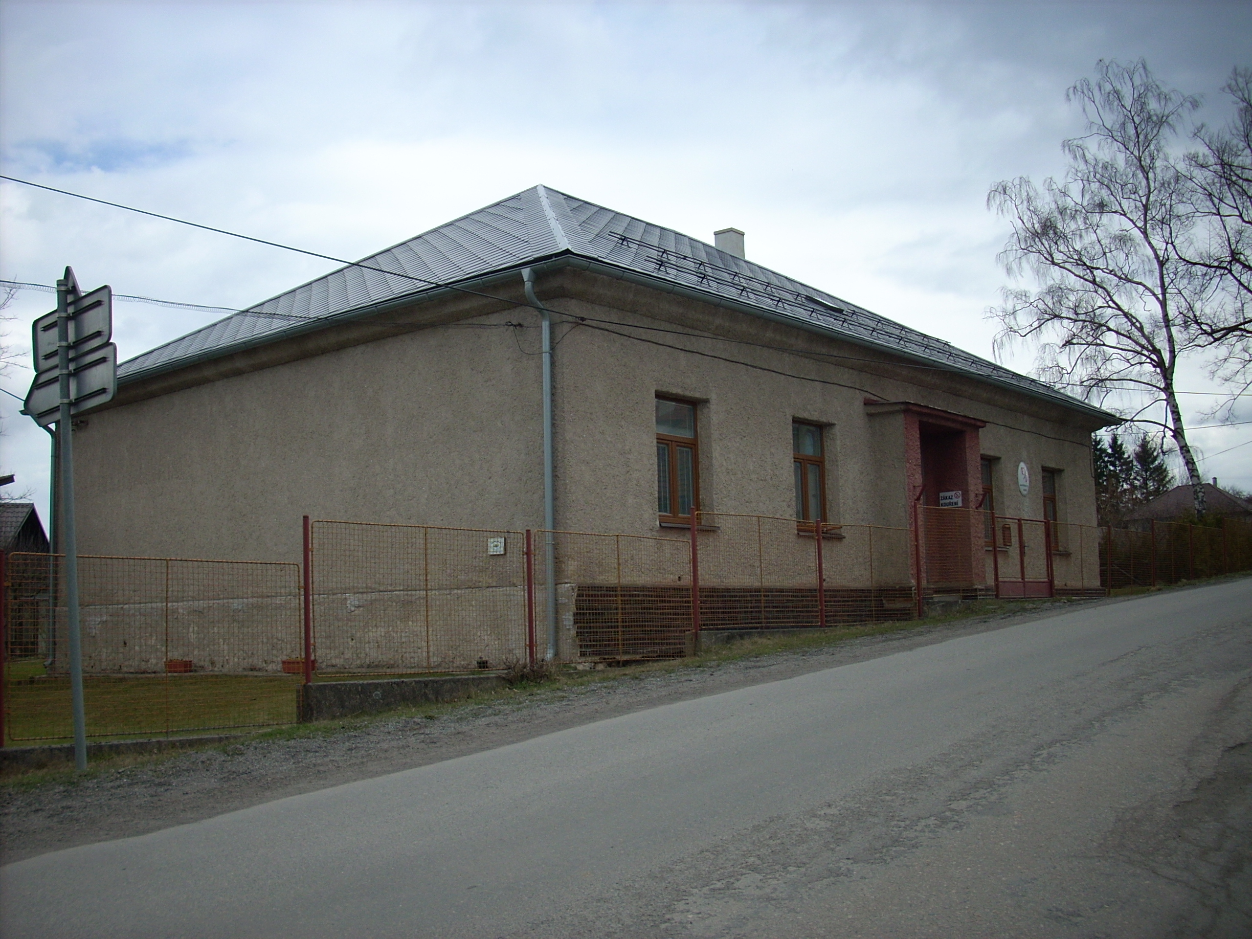 Mateřská škola, Střítež, okres Jihlava